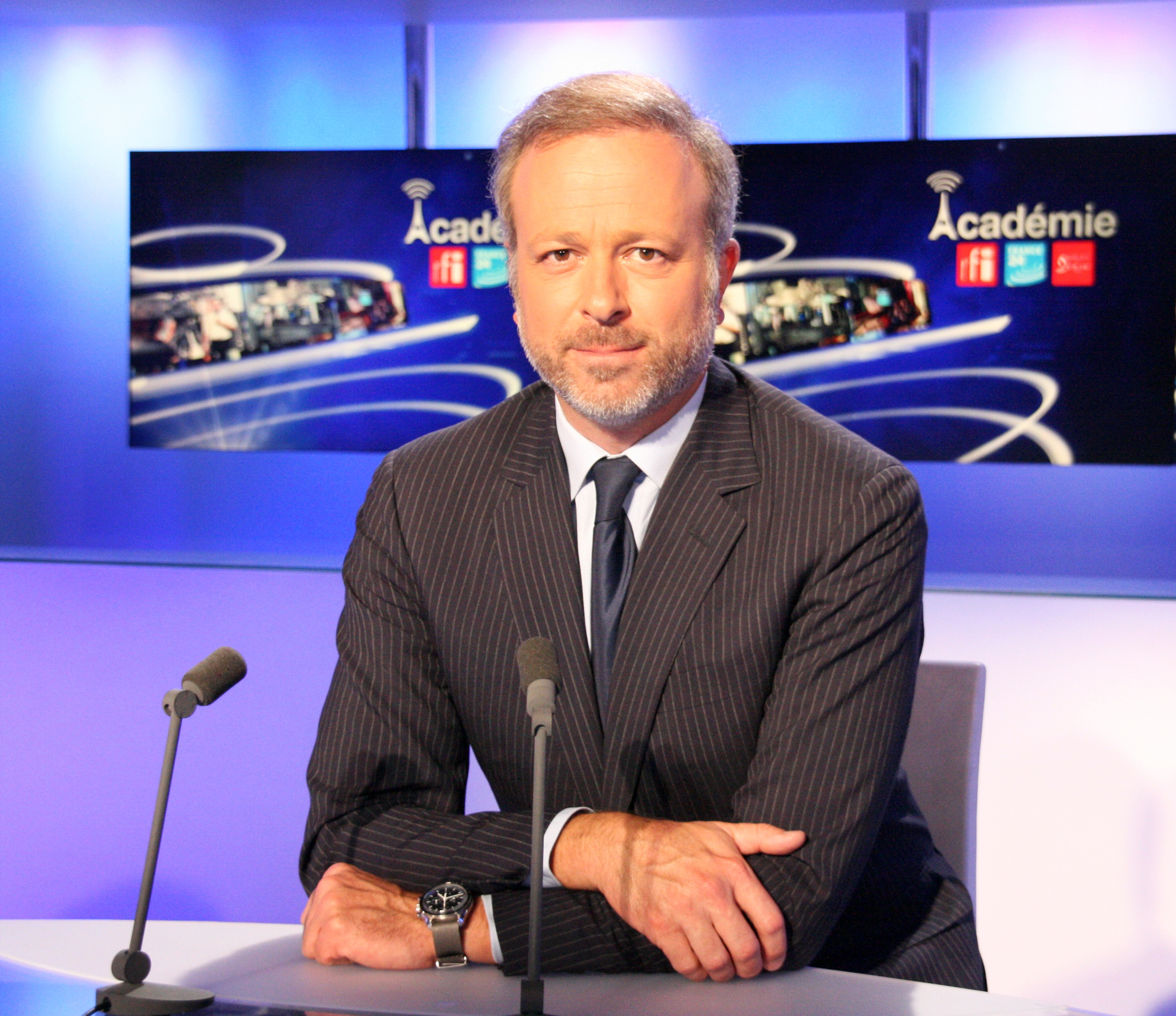 Antoine Cormery, directeur de l'Académie France24-MCD-RFI- Photo prise en studio à Issy Les Moulineaux (92)